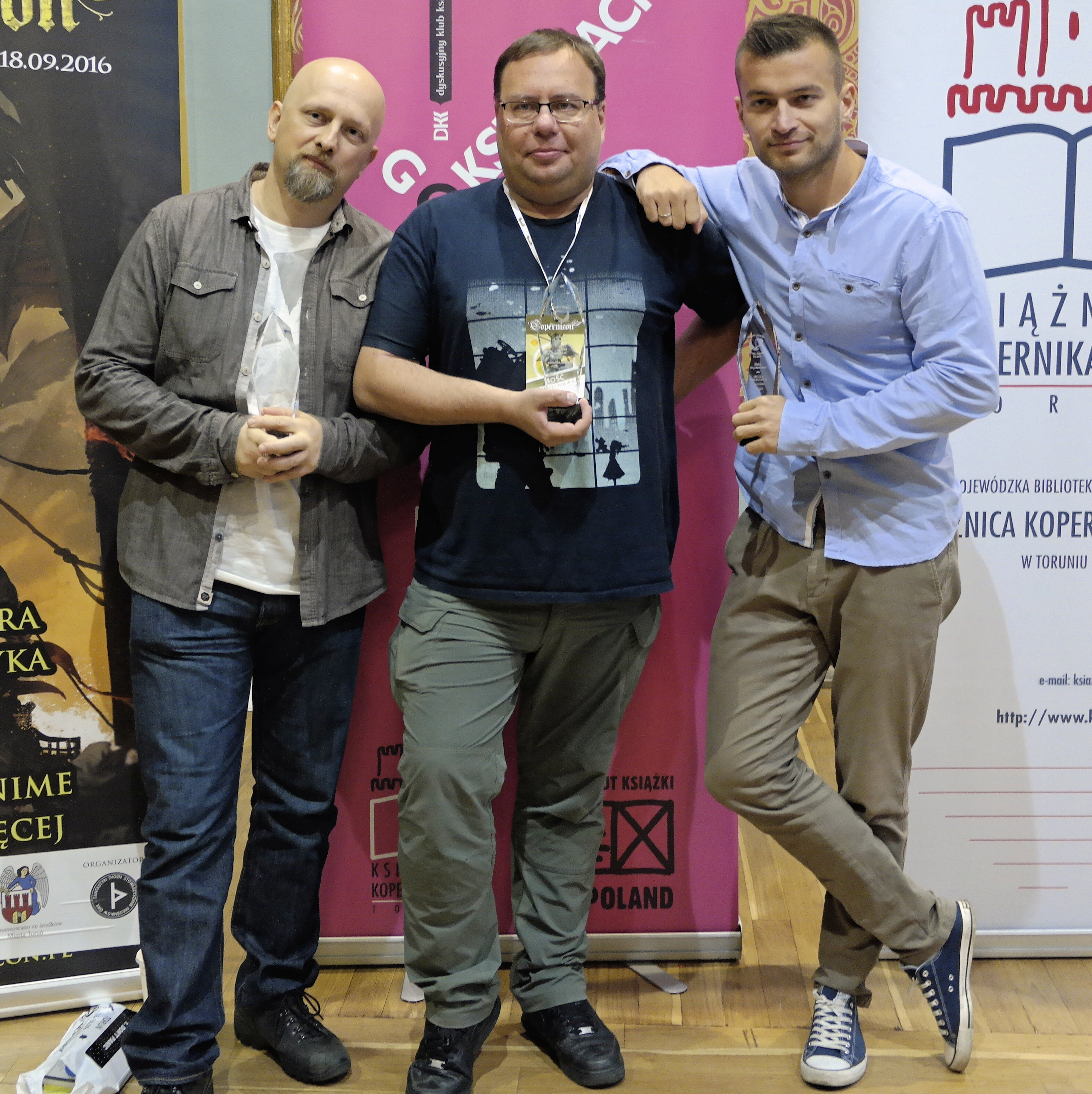 Od lewej: Robert Wegner, Paweł Majka, Jakub Małecki - Copernicon, Toruń 2016.